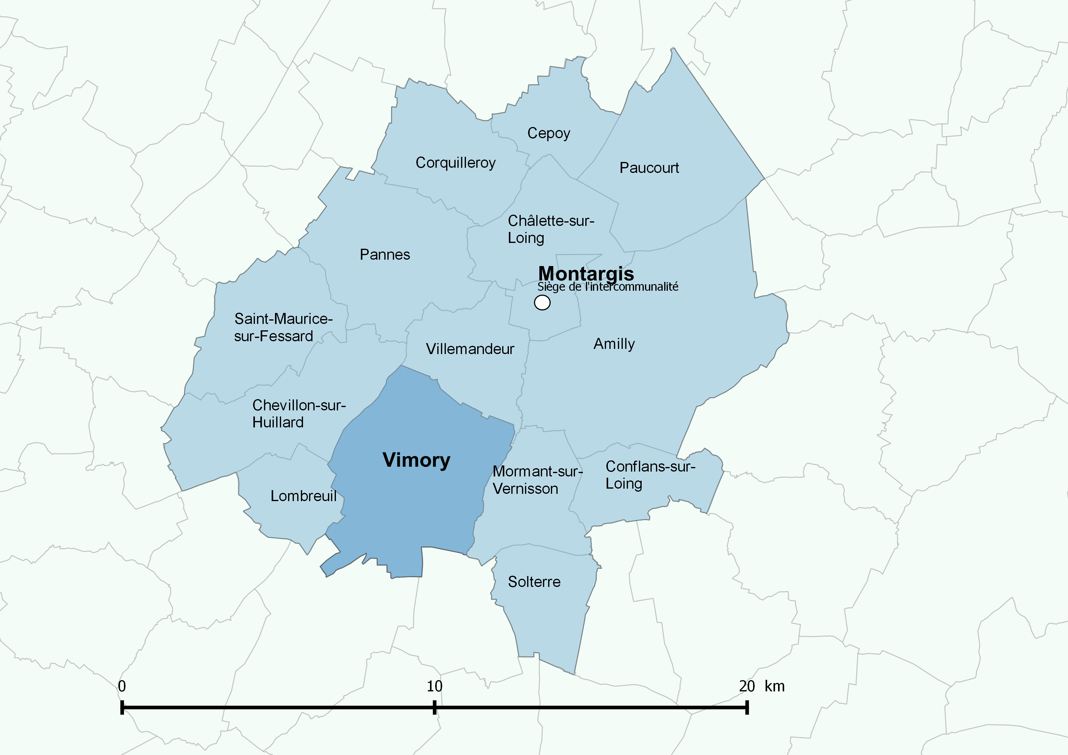 Périmètre de l'Agglomération montargoise et rives du Loing - Positionnement de la commune de Vimory